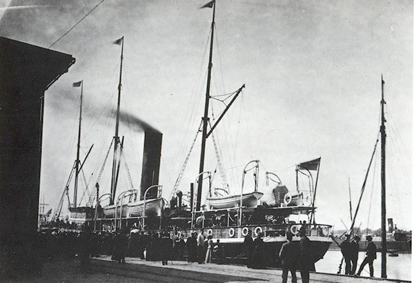 SS Romeo in Gothenburg